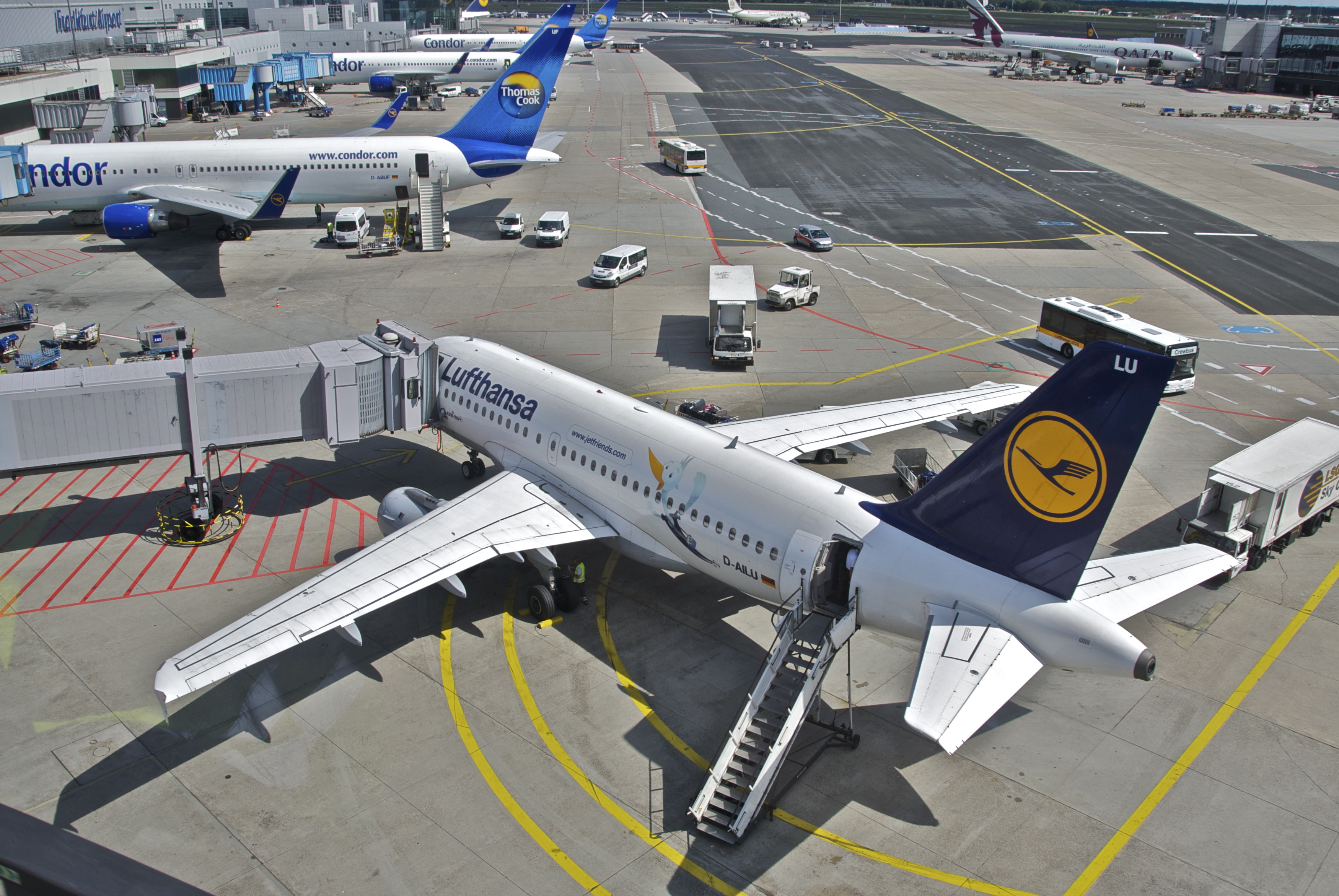 Lufthansa Airbus A319-114; D-AILU@FRA;13.08.2012/674ay